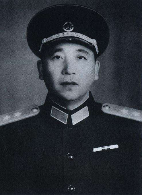 1955年，秦基伟在昆明